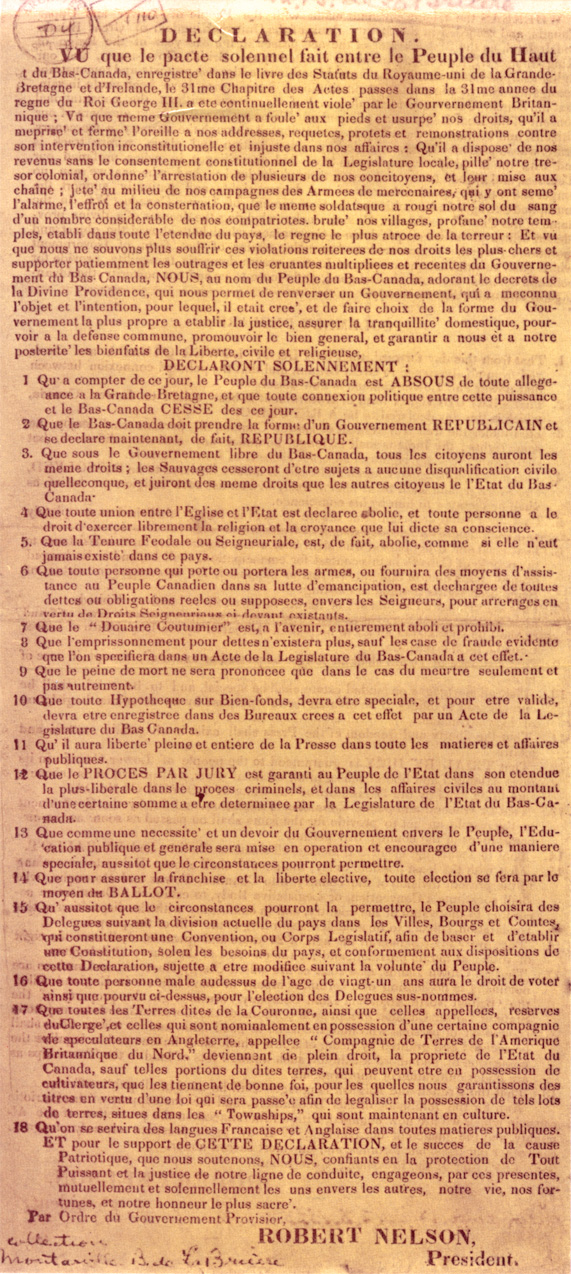 Déclaration d'indépendance proclamant la République du Bas-Canada en février 1838 Cette déclaration, signée par Robert Nelson, s'inscrit dans le contexte des Rébellions menées par les Patriotes en 1837-1838. Source : Archives du Séminaire Saint-Joseph de Trois-Rivières, cote : CL-0032-01928